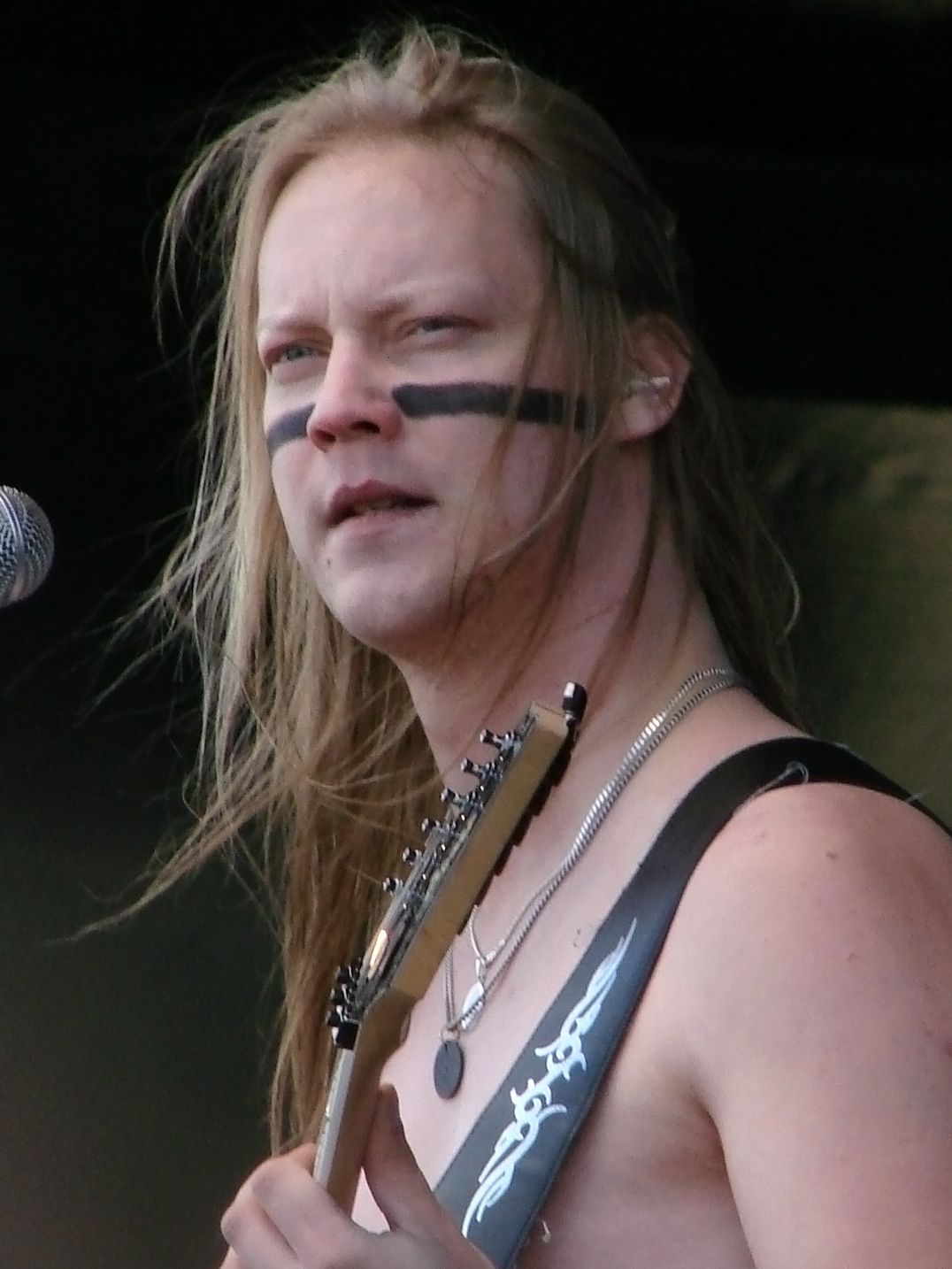 Ensiferum au Hellfest 2010, à Clisson, le 20 Juin 2010 : Petri Lindroos.